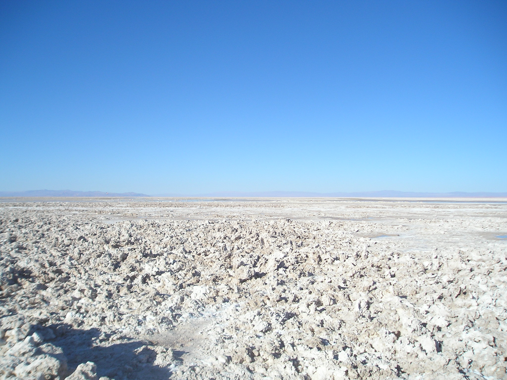 Salar de Atacama near Laguna Chaxa, south of San Pedro de Atacama, Chile